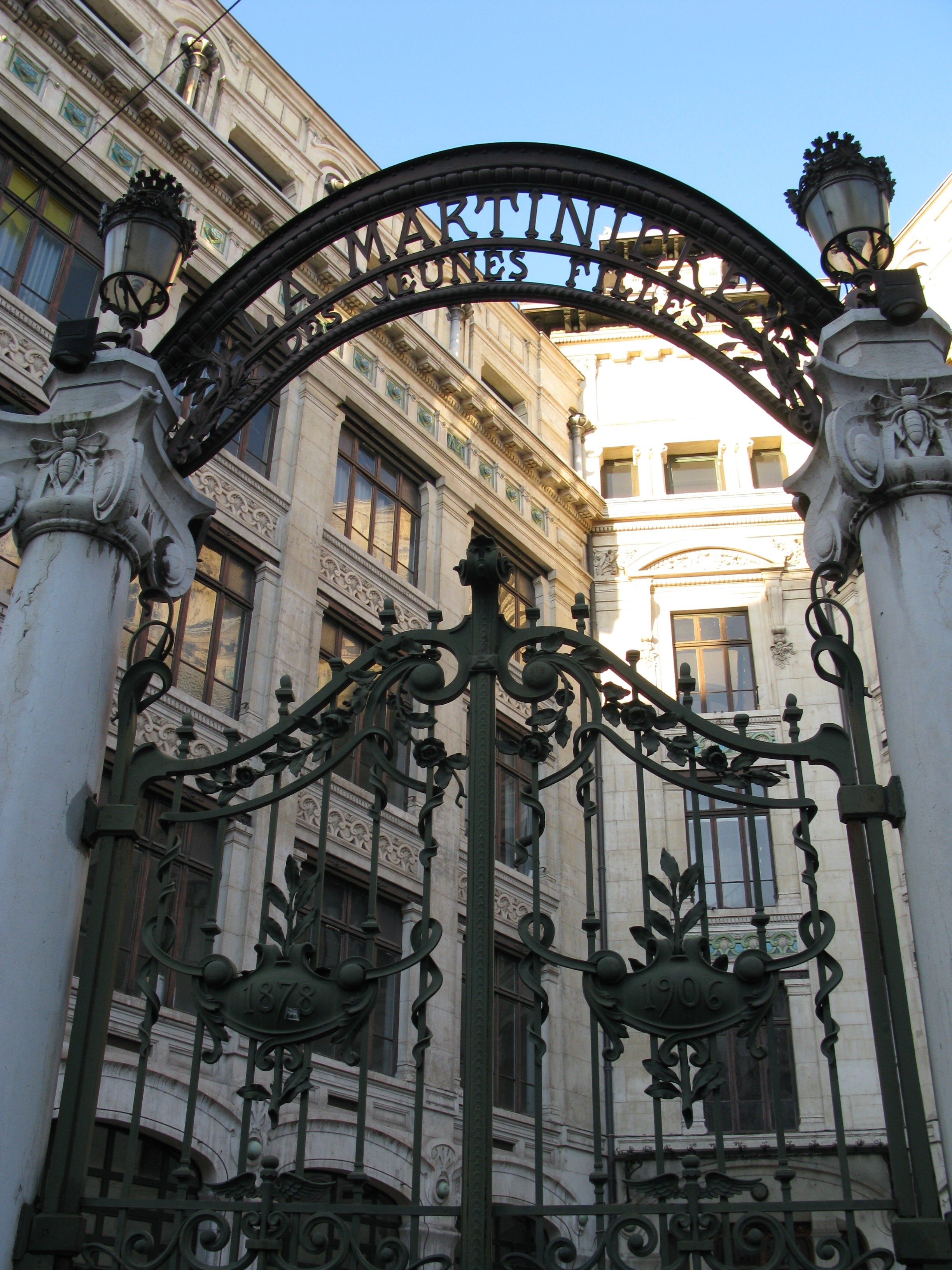 Portail du lycée de jeunes filles la Martinière dans Lyon